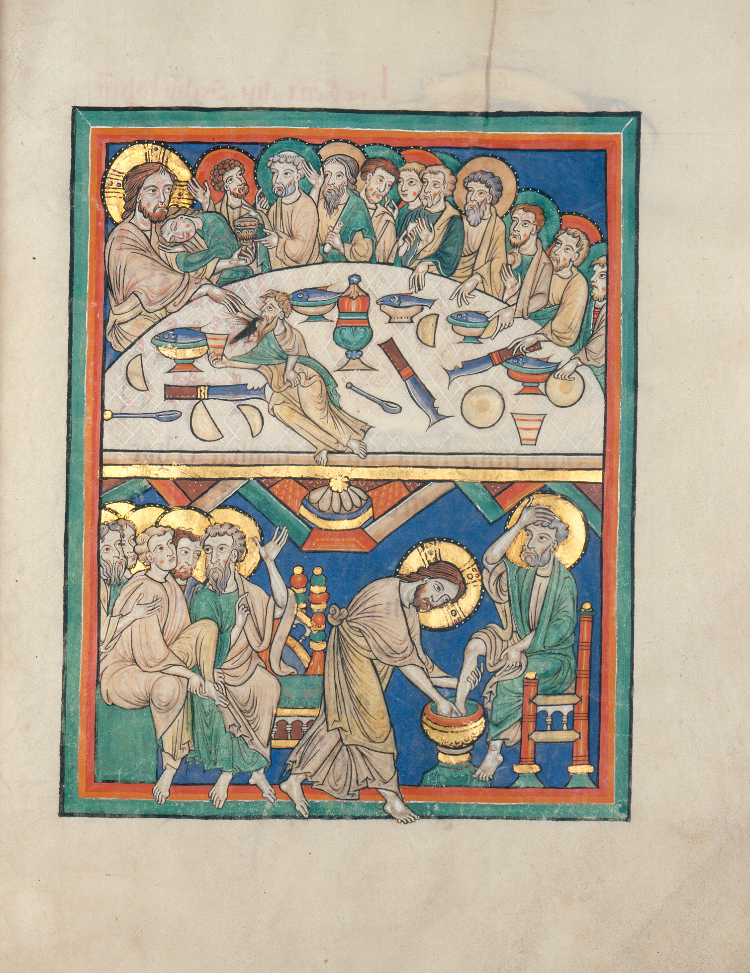 Evangelistar von Speyer, um 1220 Manuscript in the Badische Landesbibliothek, Karlsruhe, Germany Cod. Bruchsal 1, Bl. 28r